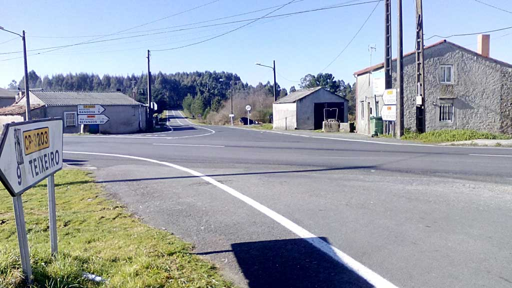 Cruce da Queimada.